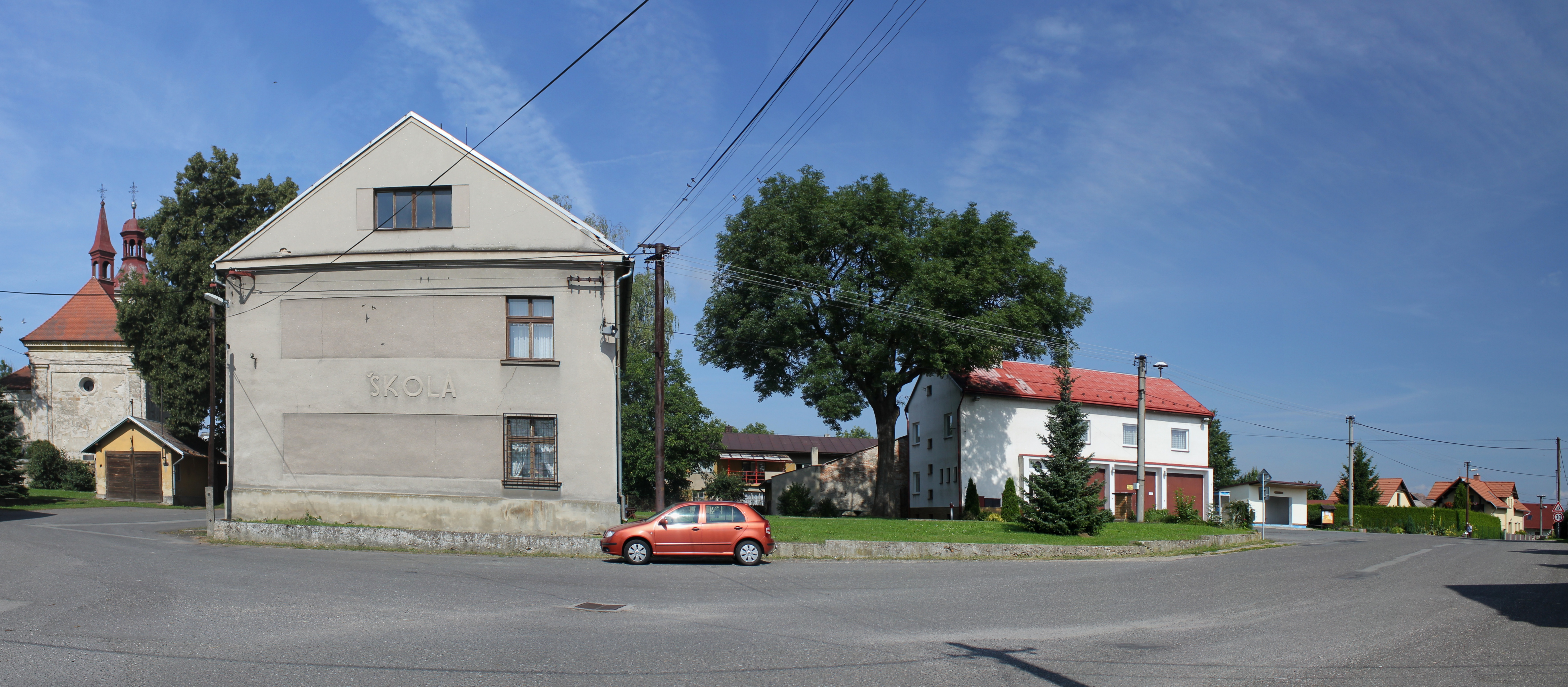 Náves v Loukovci